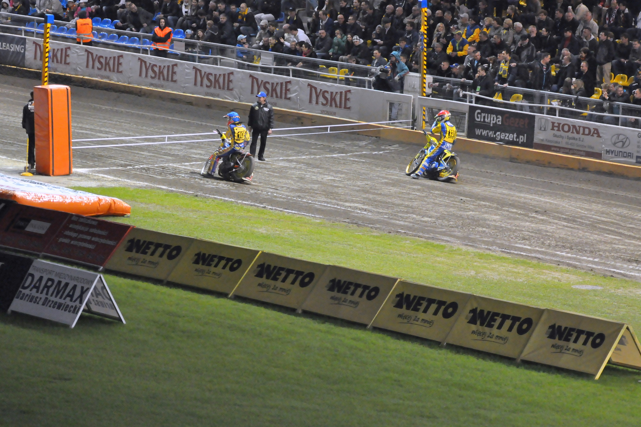 Gorzów Wlkp.- 13. 05. 2012 r. Bieg 11 - zawodnicy Stali Gorzów czekają na zawodników Stelmetu Falubaz Zielona Góra. Zielonogórzanie nie wyjeżdżając do tego biegu spowodowali przerwanie przez sędziego meczu. Jako powód podano potrzebę żałoby, po ogłoszeniu przez spikera zawodów informacji o śmierci Lee Richardsona, który w tym dniu uległ ciężkiemu wypadkowi na torze we Wrocławiu. Bieg 11 zakończył się zwycięstwem Michaela J. Jensena (kask niebieski) przed Krzysztofem Kasprzakiem (k. czerwony), a wykluczeni zostali zielonogórzanie, Aleksander Łoktajew i Jonas Davidsson.